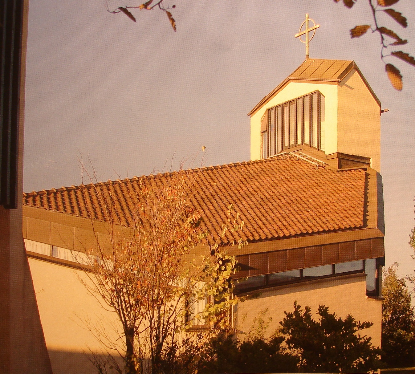 Mariakyrkan på Fyllinge i Halmstad